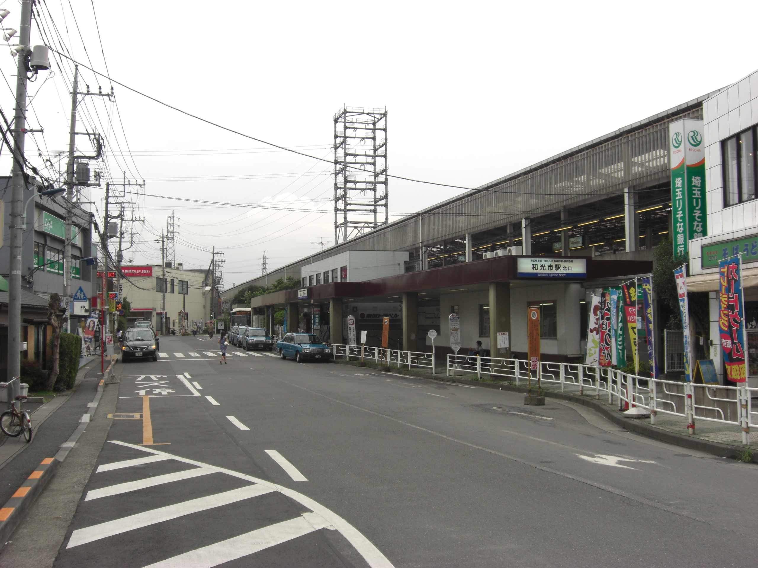 和光市駅北口全景